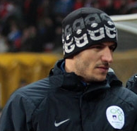 Zlatan Ljubijankić